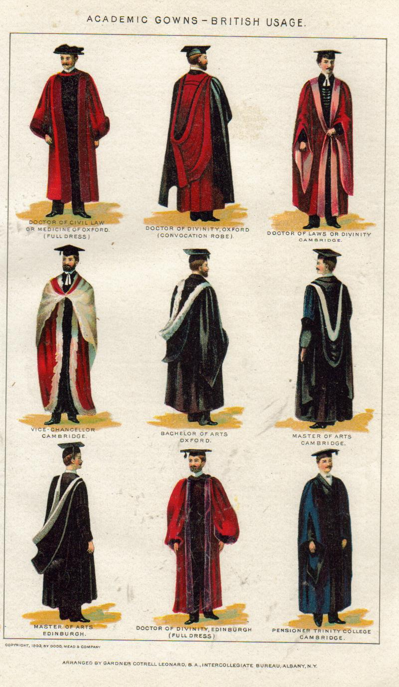 Painting